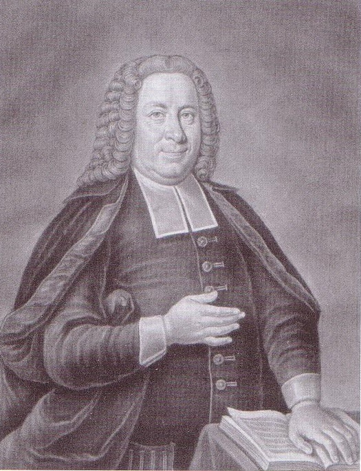 Porträt von Johann Jakob Quandt (1686-1772)